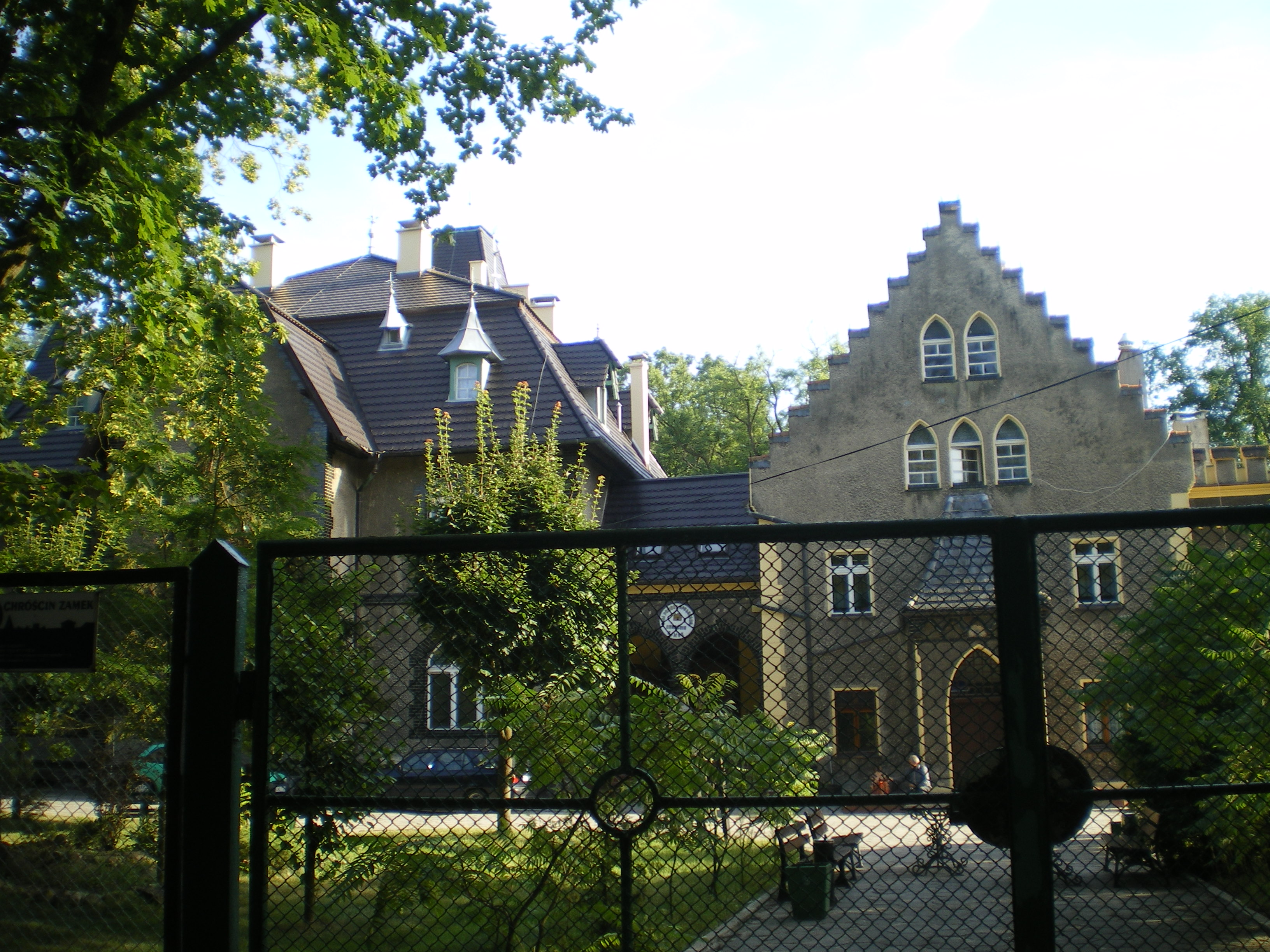 Chróścin, pałac, tzw. Zamek, 4 ćw. XIX